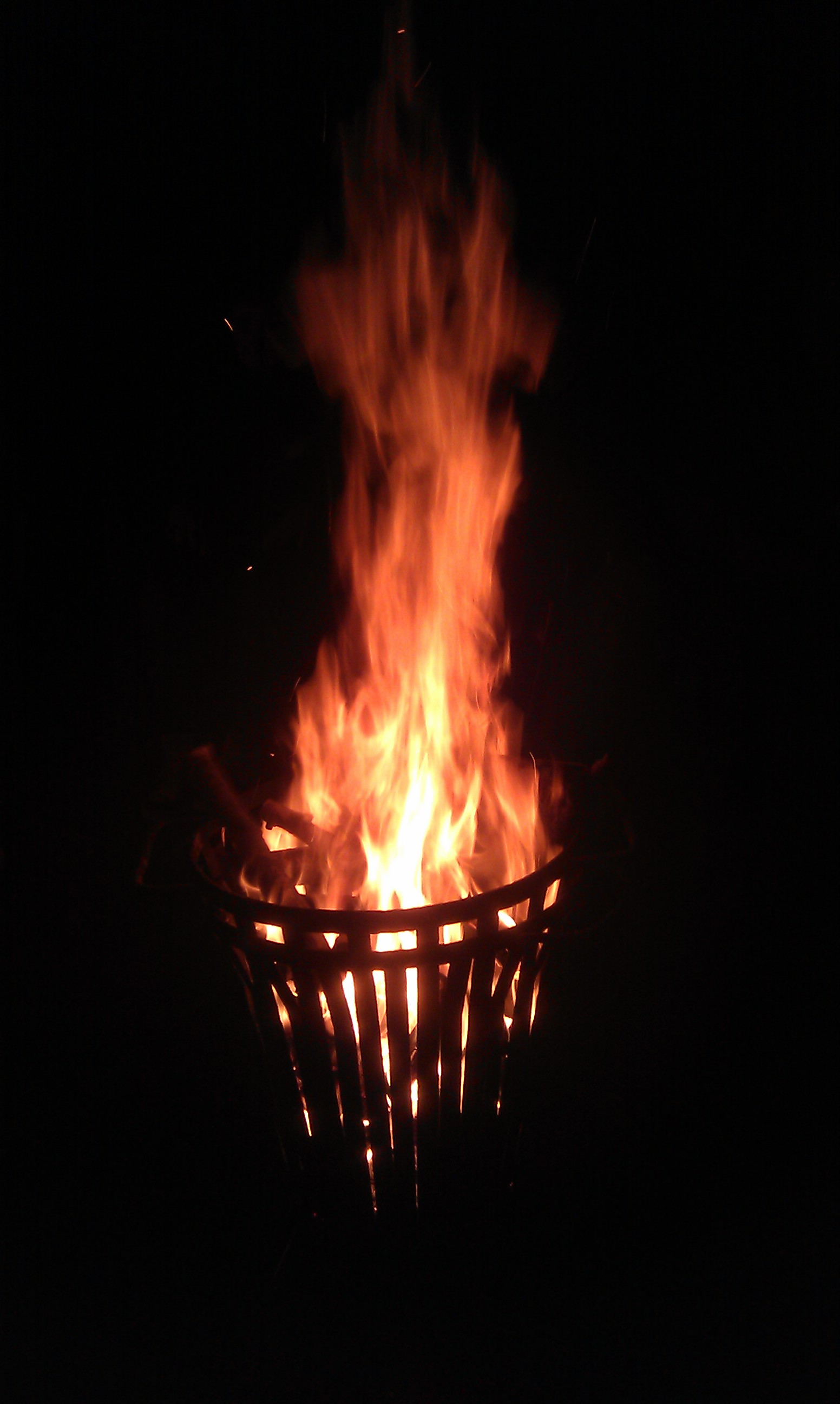 vuurkorf